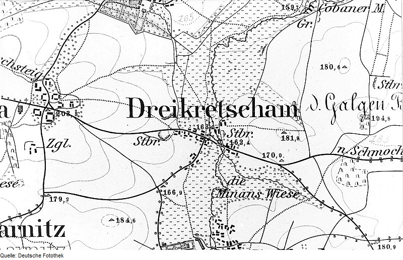 Original image description from the Deutsche Fotothek Göda-Dreikretscham. Meßtischblatt, Sekt. Kloster Marienstern, 1884